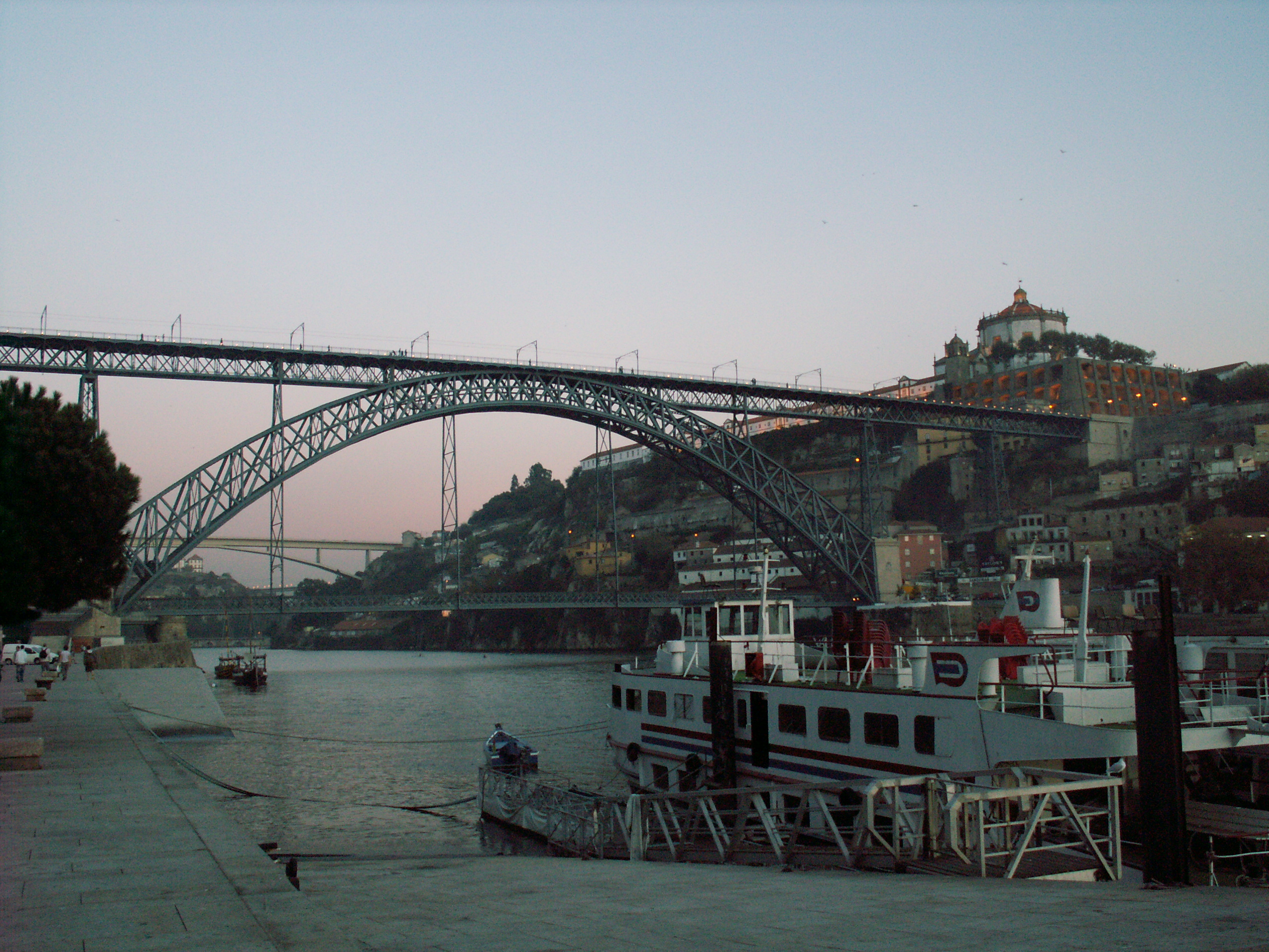 Ponte dom luis I